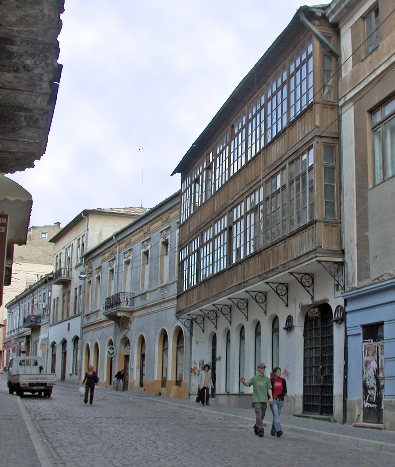 Romania, Bucarest, via Selari